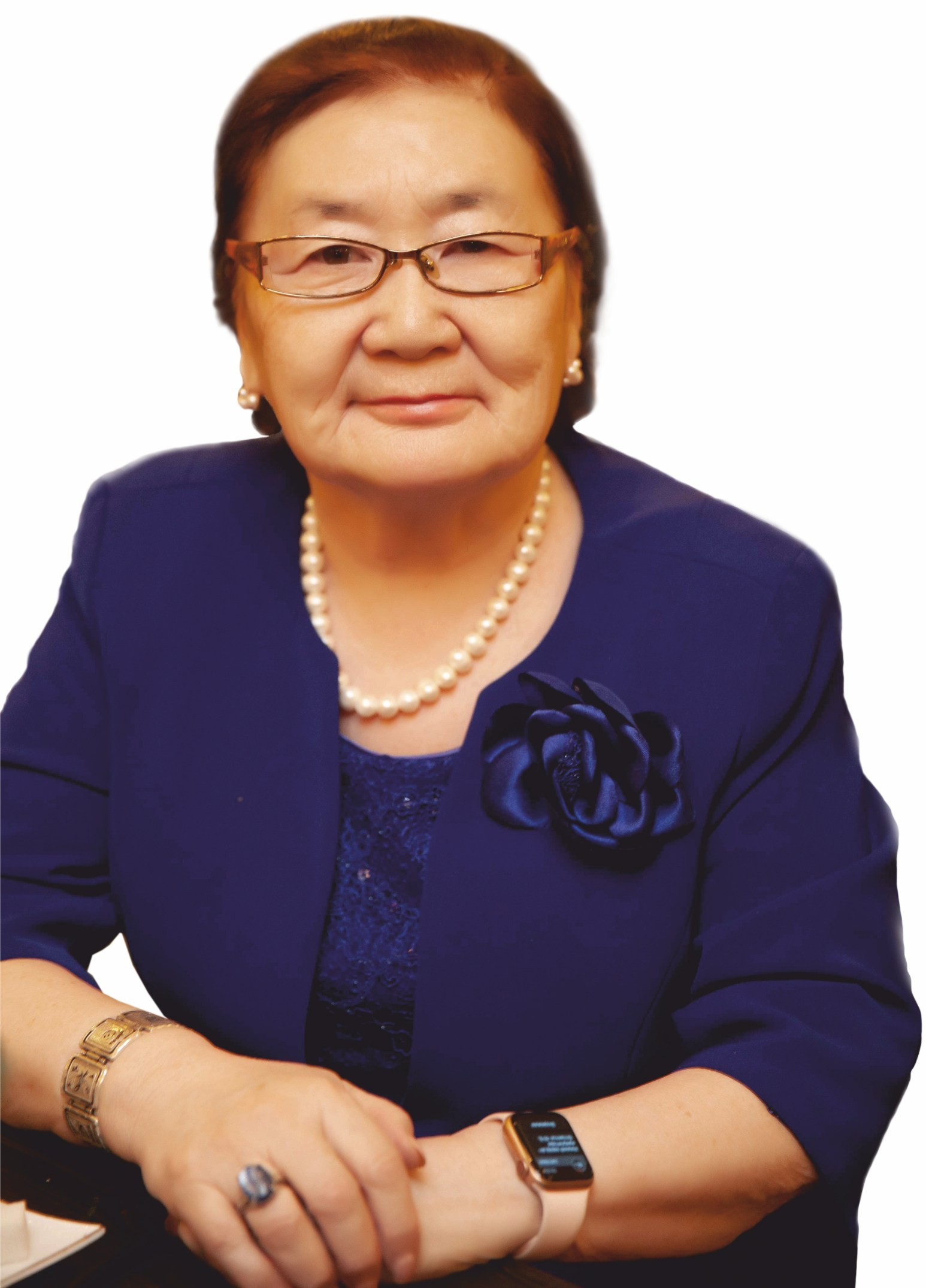 Ульяна Алексеевна Винокурова